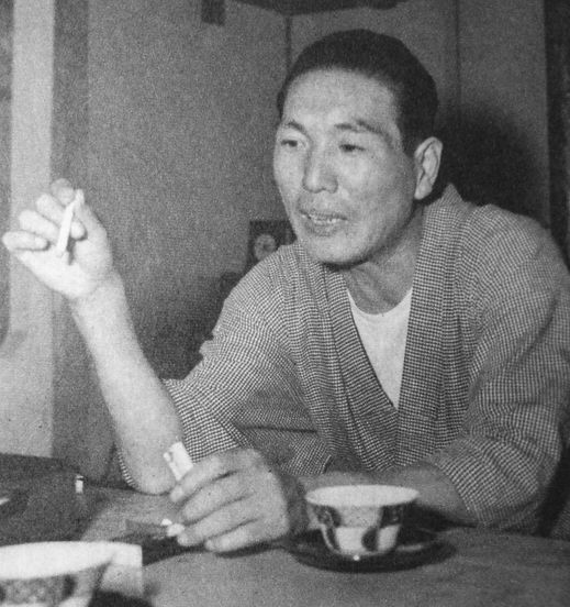 山本一人